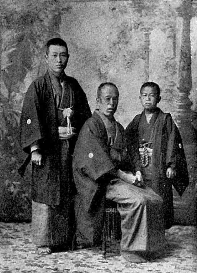 明治33年4月 針塚長太郎、父喜惣治および末弟卯八とともに